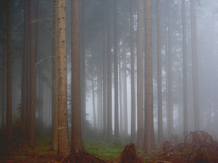 Fichtenwald